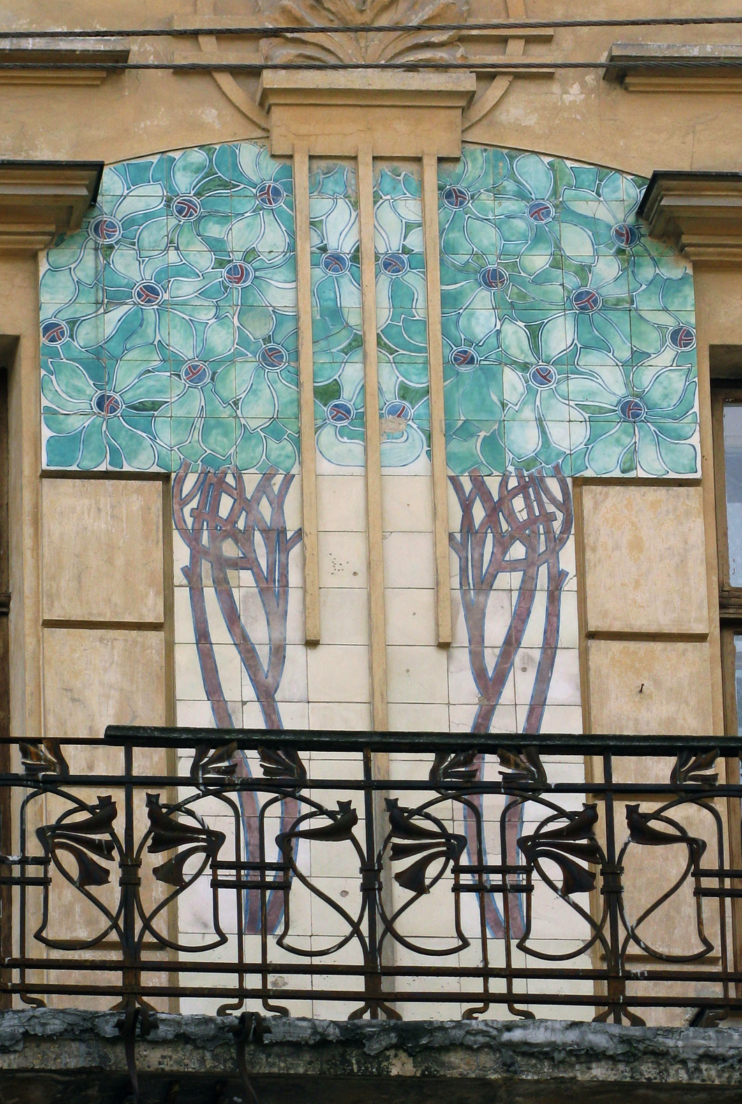 Будинок №2 по вулиці академіка Павлова. Керамічне панно на фасаді.